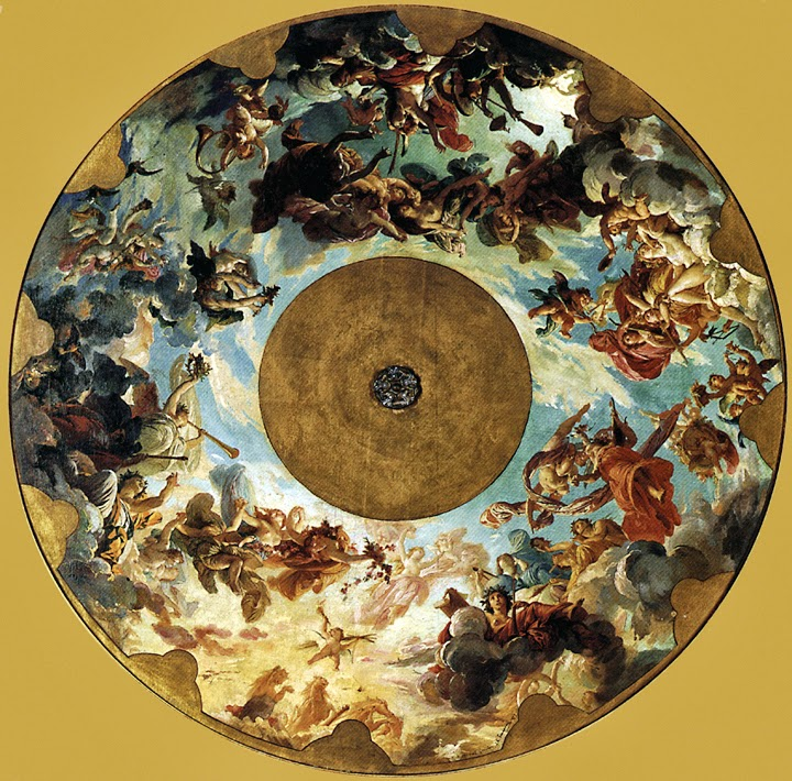 Jules Lenepveu (1819-1898): Les Muses et les Heures du jour et de la nuit, esquisse pour la peinture du plafond de l'Opéra Garnier, conservée au Musée d'Orsay, Paris, France. Le plafond de l'Opéra achevé par Lenepveu en 1871 est depuis 1964 camouflé par une oeuvre de Marc Chagall.